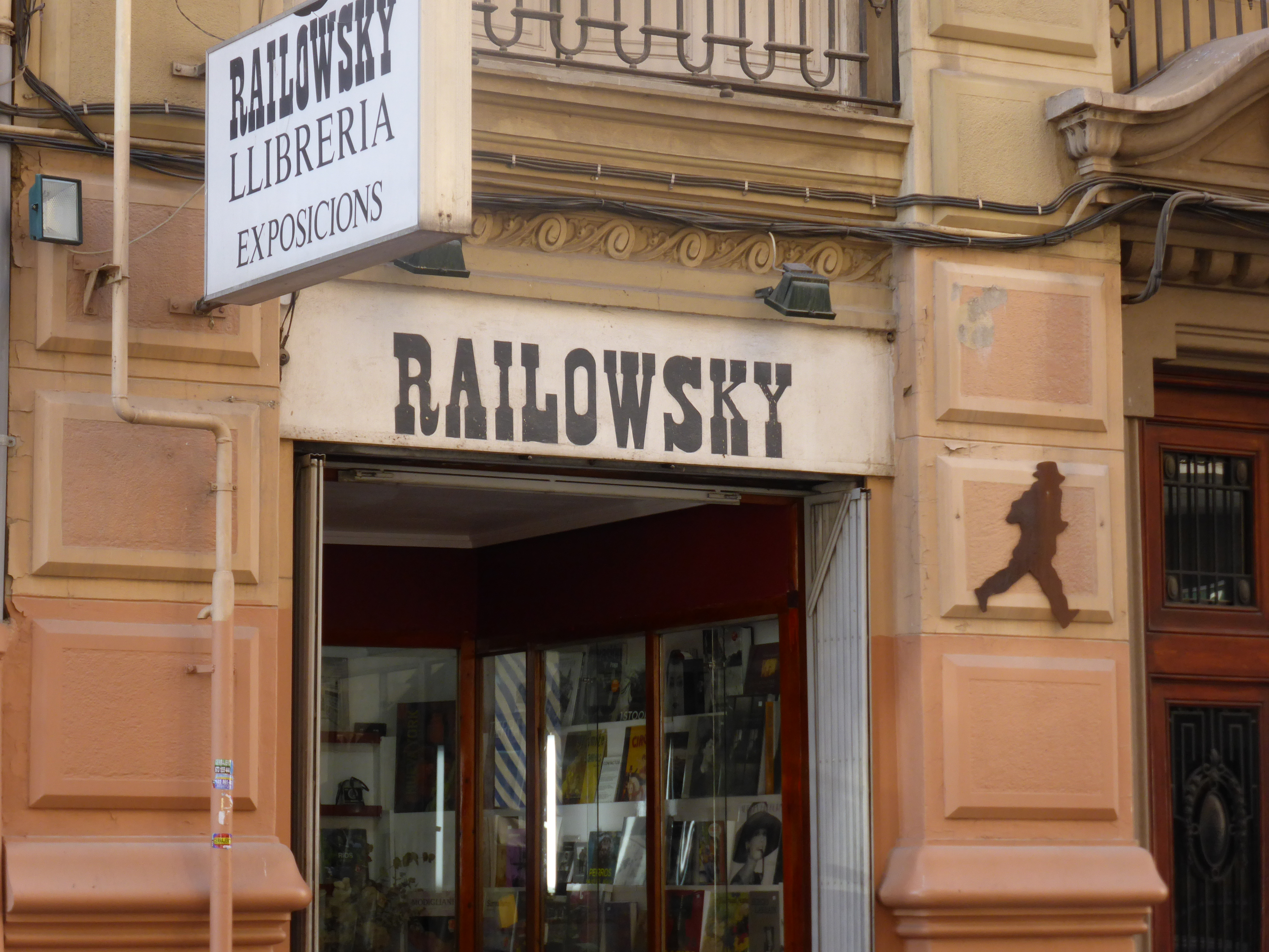 En la ciudad de Valencia (España), en 1985 se fundó una librería y sala de exposiciones de fotografía. Al cumplir 25 años, la "Universidad Politécnica de Valencia" publicó un libro monográfico reseñando la importante labor cultural realizada. Ha realizado más de 200 exposiciones de fotografía, de autores como: Alberto Schommer, Ramón Masats, Xavier Miserachs, Bernard Plossu, Juan Manuel Díaz Burgos, Xurxo Lobato, Jean Dieauzaide, Koldo Chamorro, Gary Winogrand, Mary Ellen Mark, Juan Manuel Castro Prieto, Ferdinando Scianna, Franco Fontana, Tina Modotti, Juan Rulfo,... El nombre "Railowsky" se tomó del cartel que aparece en una fotografía de entreguerras de Henri Cartier-Bresson (1908-2004), en la que un hombre está saltando sobre un charco. En realidad la palabra "Railowsky" está incompleta en la foto de Cartier-Bresson, pues le falta una letra "B" inicial. O sea, el cartel anunciaba al pianista Brailowsky (Alexander Brailowsky), especializado en la obra pianística de Fryderyk Franciszek Chopin (Szopen).